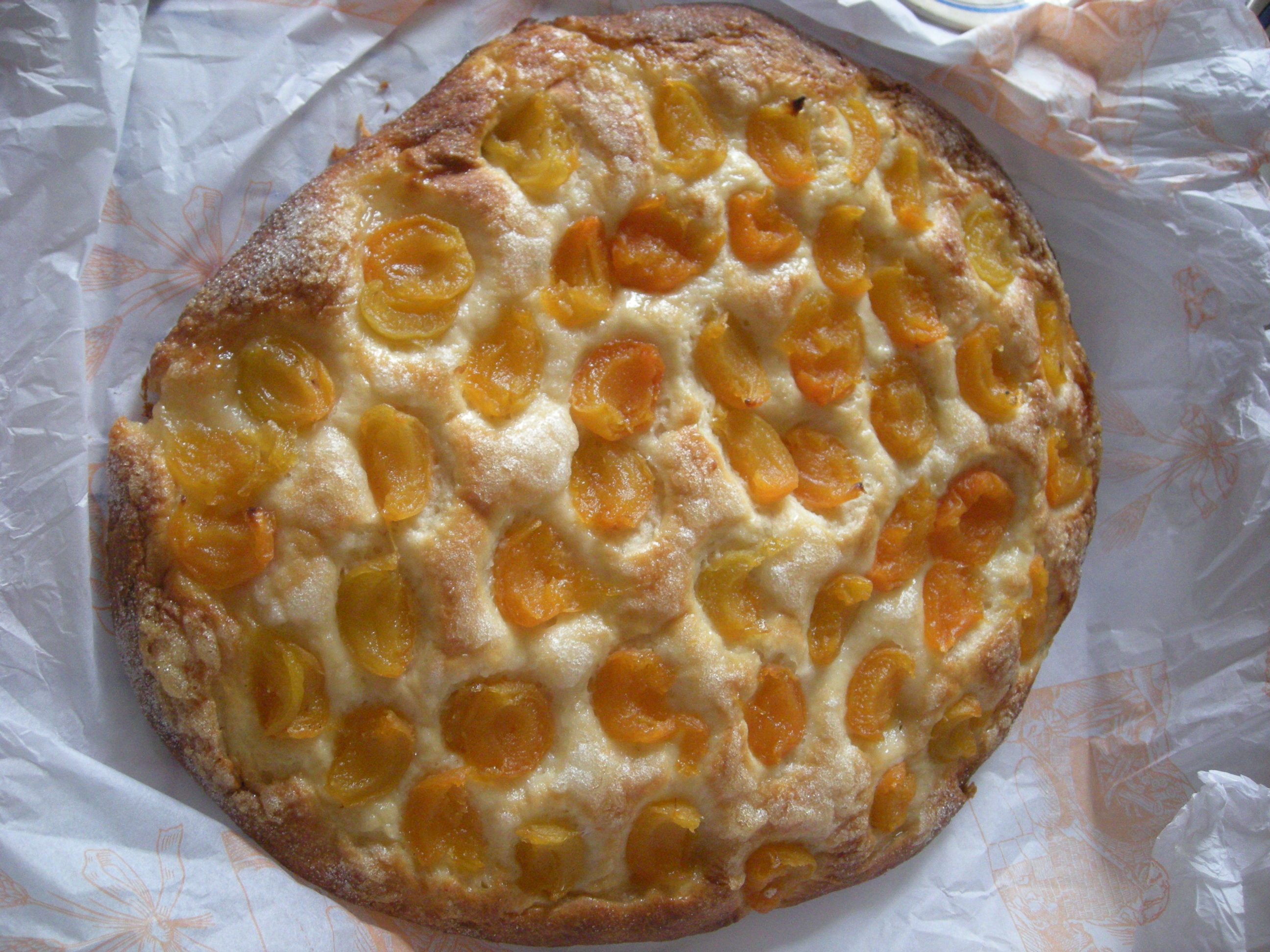 Coca d'albercocs. Forn de Ca'n Biel des Mosso. Son Carrió. Mallorca.